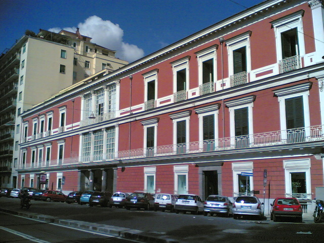 Palazzo monumentale alla Riviera (Napoli)